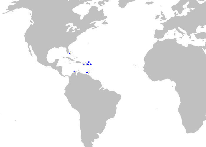 Distribution map for Apristurus canutus